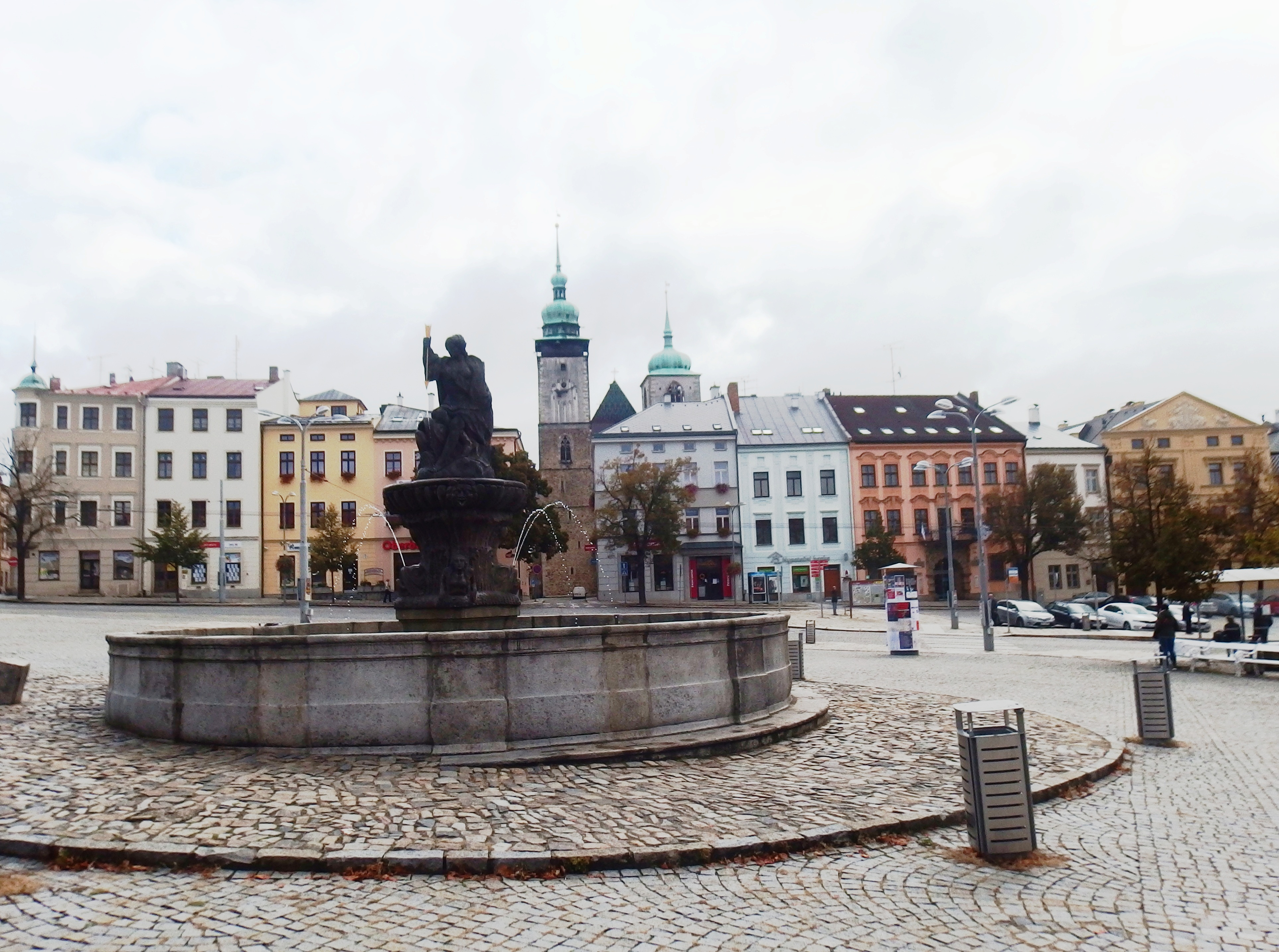 Kašna Amfitrite, Masarykovo náměstí, jižní část, parc. 6034/1, Jihlava.